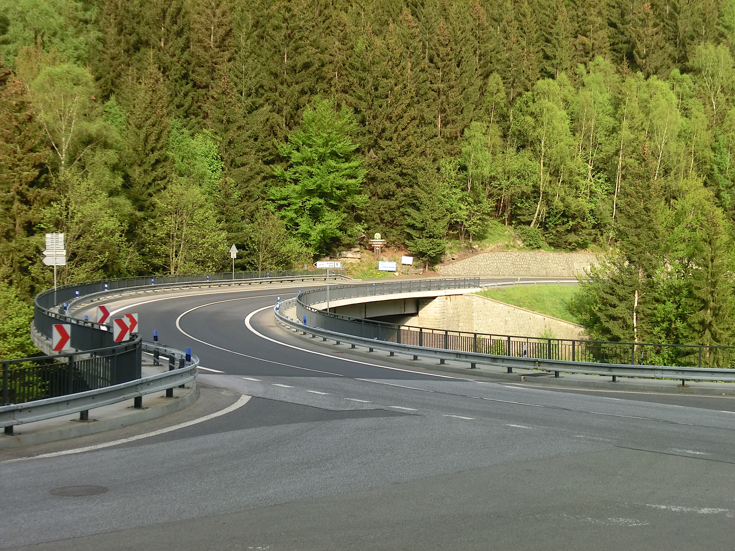 Železobetonový most z předpjatého betonu, se svažující se klopenou mostovkou v zatáčce o poloměru pouhých 80 m. Délka mostovky 84 m, šířka 12 m, postaven v letech 1963 až 1966 jako součást tehdejší evropské hlavní silnice E14.